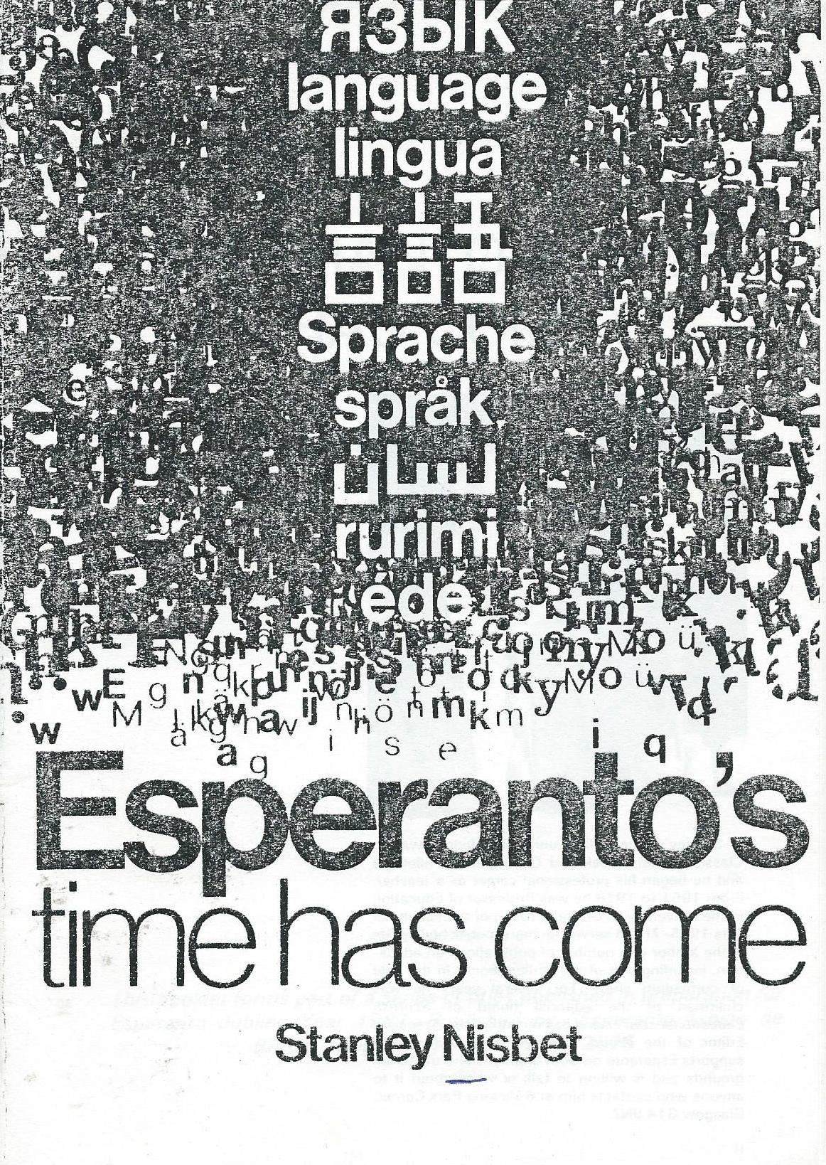 librokovrilo de "Esperanto's Time Has Come", 1987